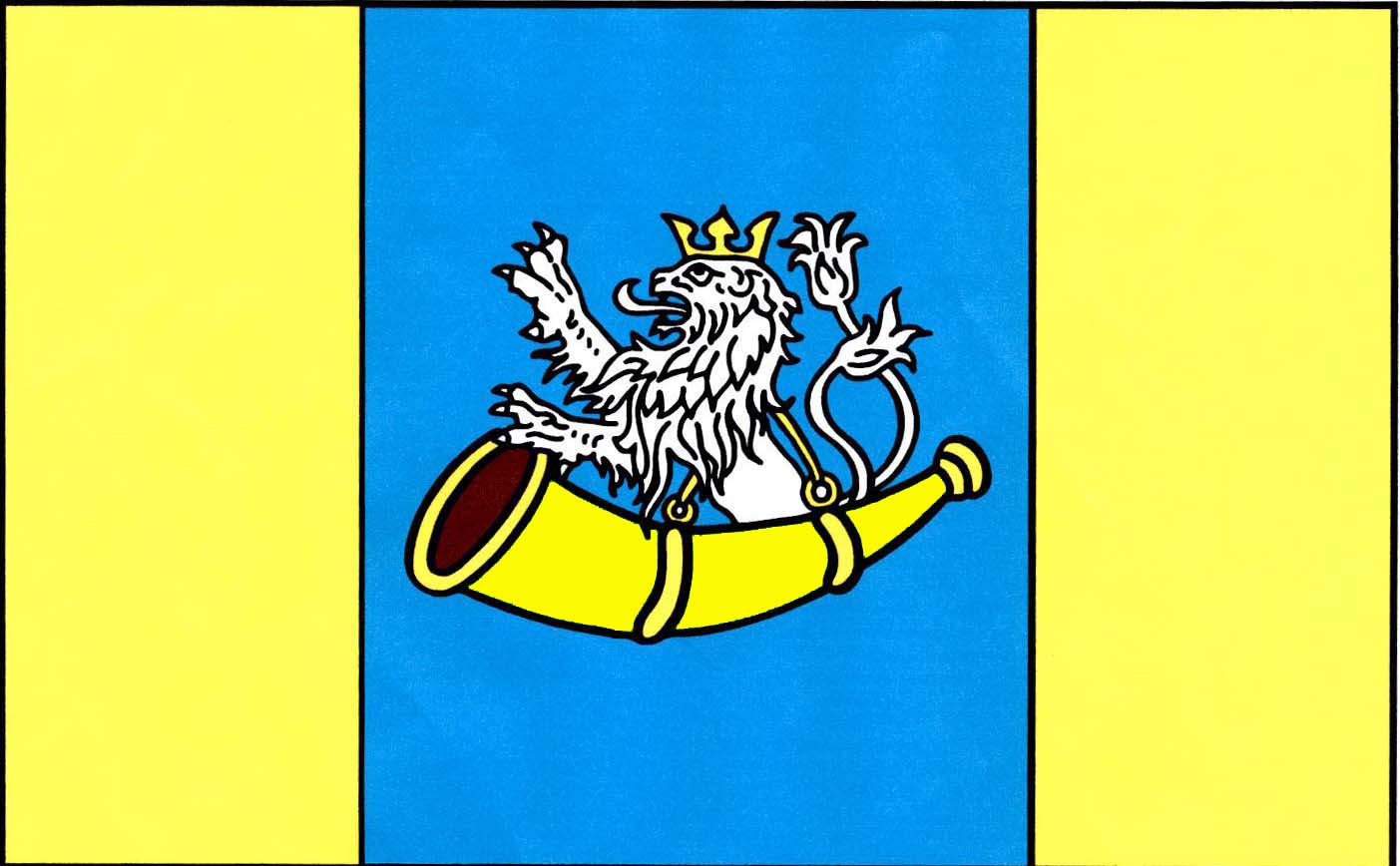 Vlajka obce Veltruby